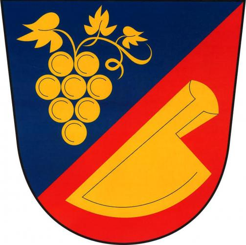 Těšetice, okres Znojmo, znak